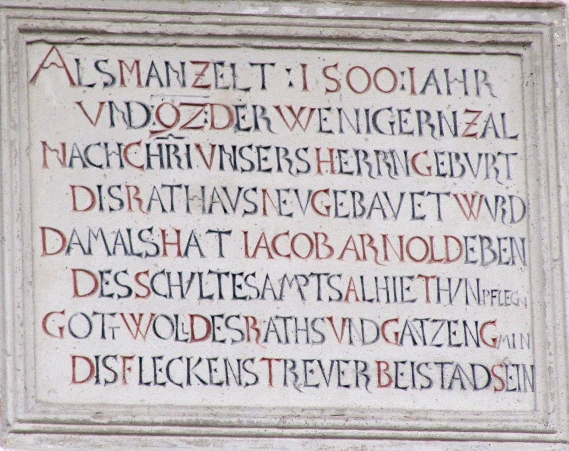 Gründungstafel am Rathaus in Sickershausen: Als man zelt 1500 iahr und 92 der wenigern Zal nach Chri. unsers Herrn Geburt dis Rathaus neu gebauet wurd Damals hat Iacob Arnold eben des Schultesampts alhie thun pflegn Gott woll des Raths und gantzen Gmin dis Fleckens treuer Beistand sein